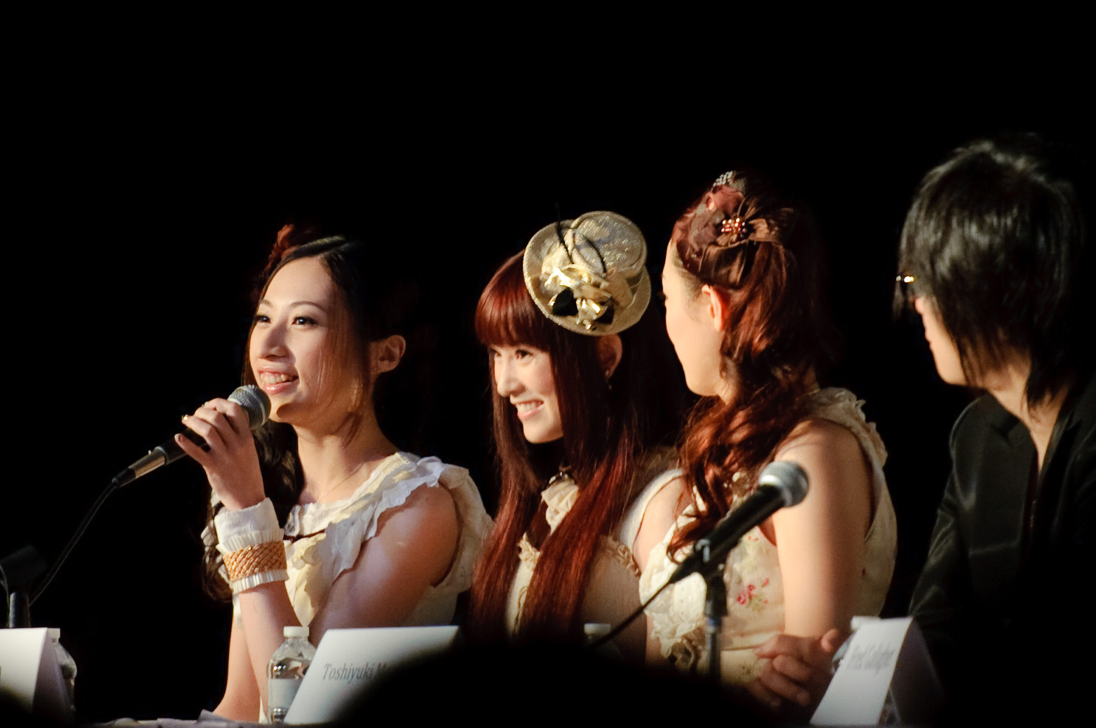 Kalafina